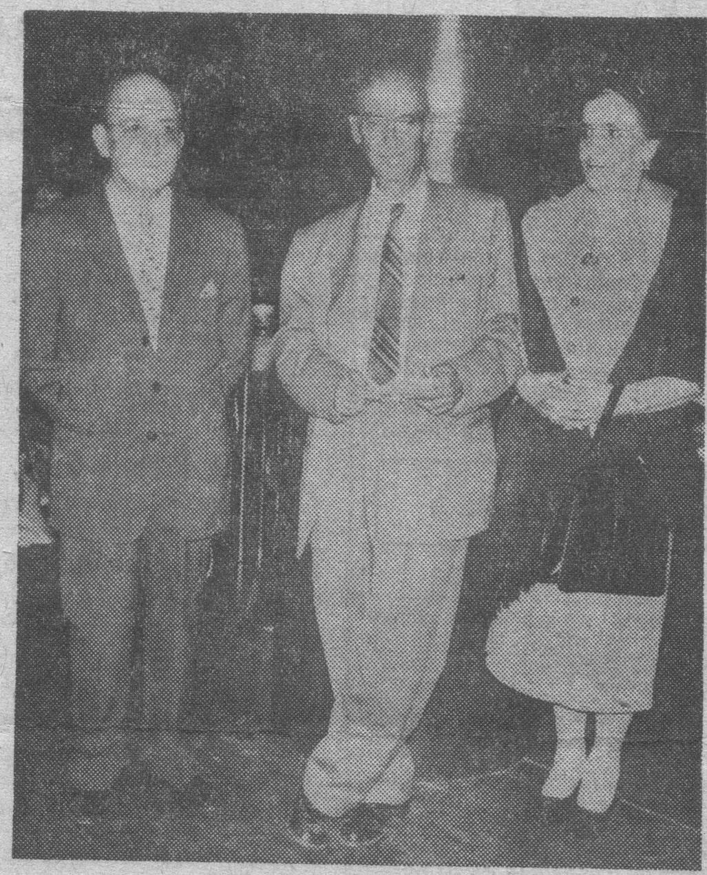 Blanca Isaza (derecha), Baudilio Montoya (centro), Juan Bautista Jaramillo meza (derecha)